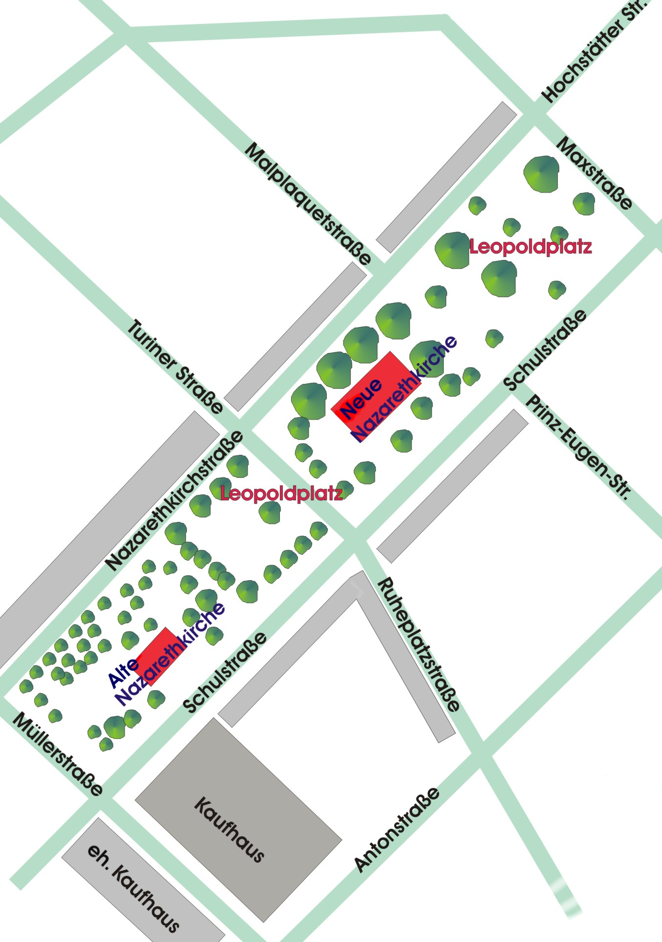 Lageplan des Leopoldplatzes mit angrenzenden Straßen, genordet